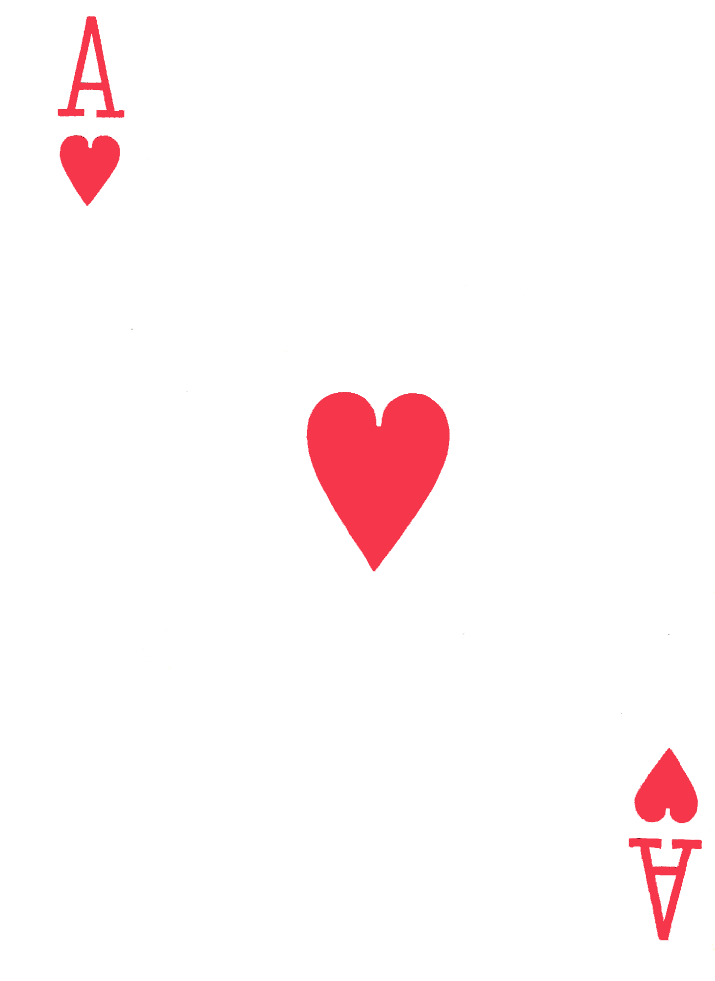 Baraja francesa: as de corazones.